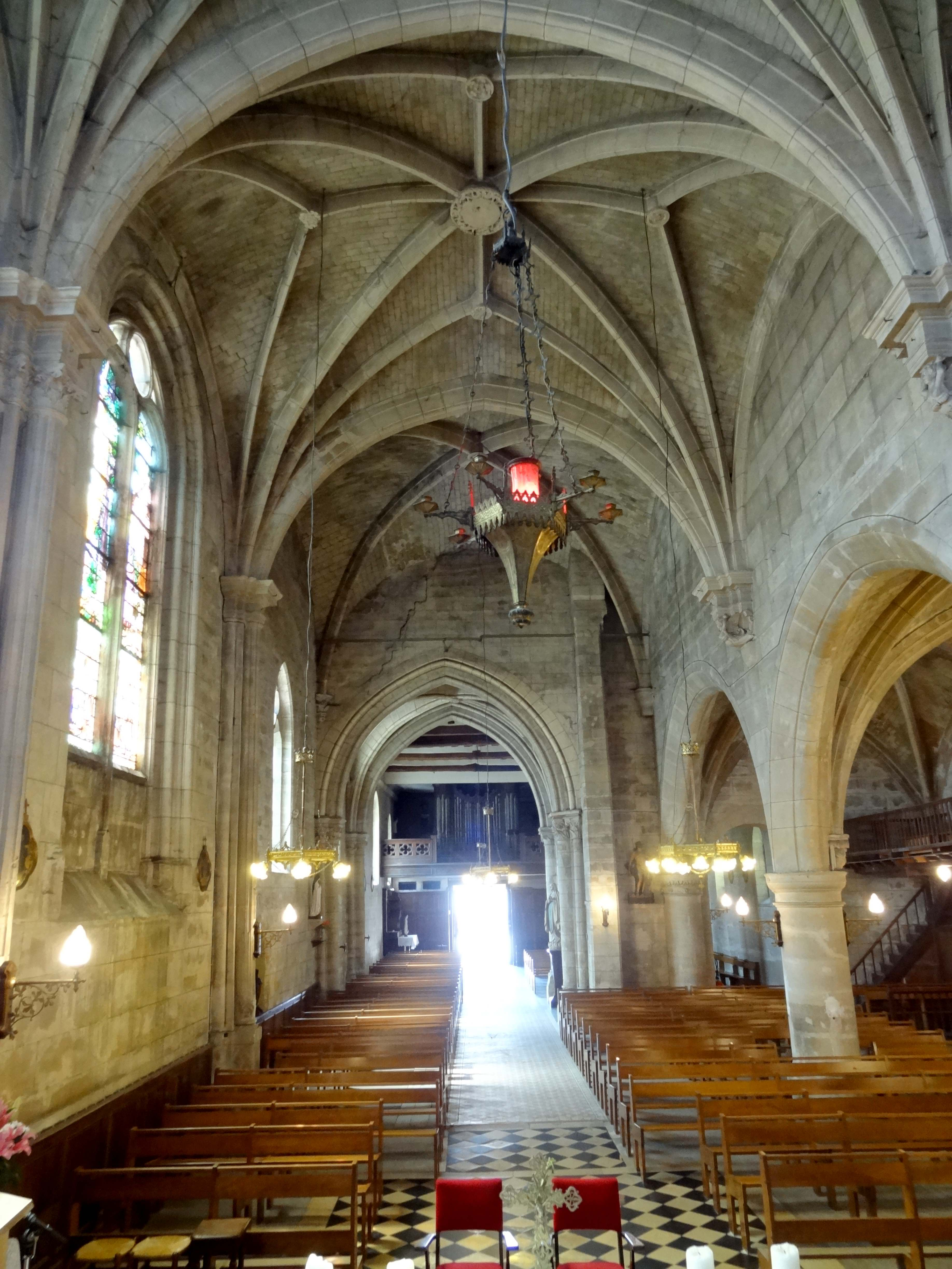 Intérieur de l'église - voir titre.